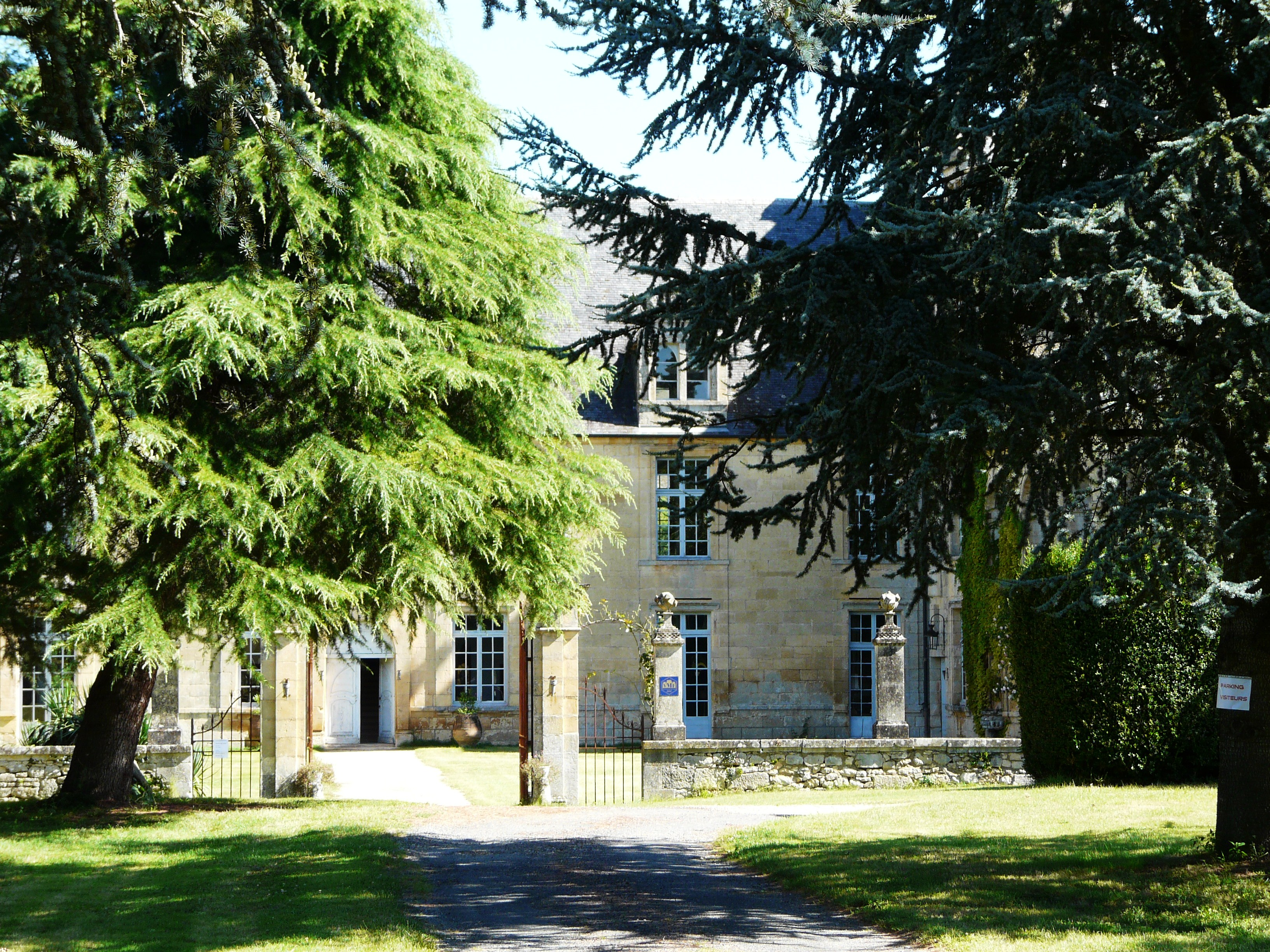 L'entrée du château de Sauvebœuf, Aubas, Dordogne, France